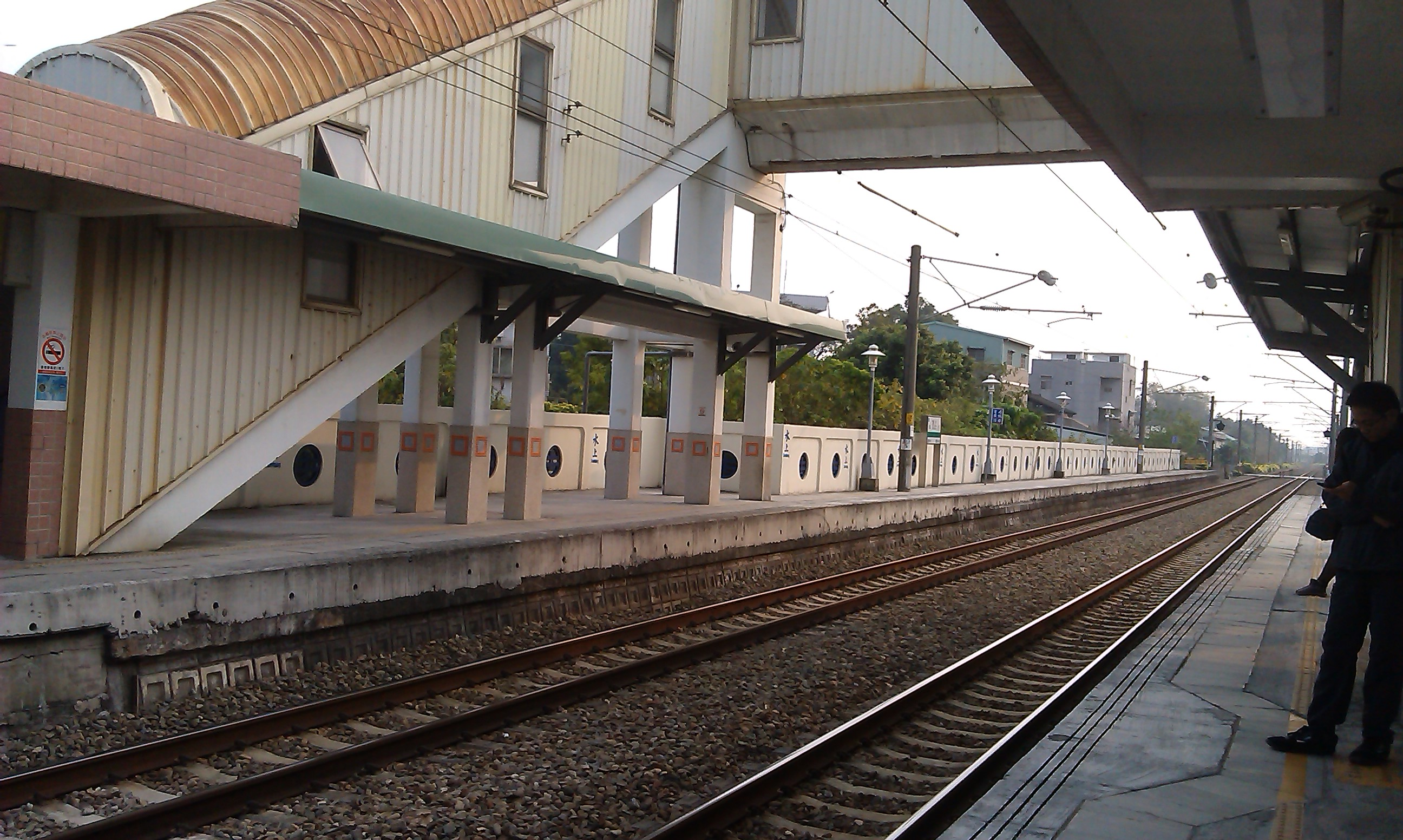 嘉義縣水上鄉 水上火車站